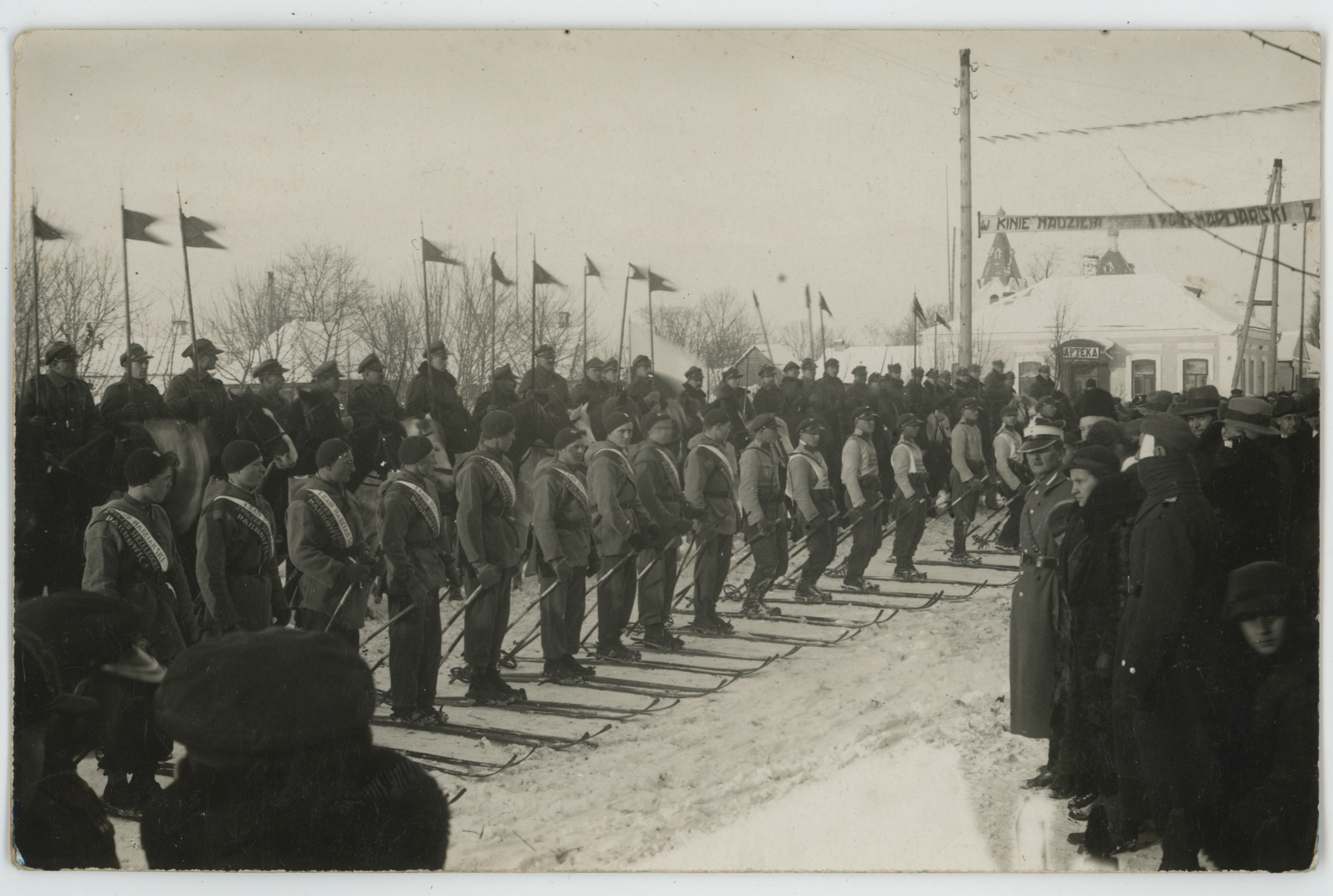 Беларуская (тарашкевіца): Дубровіца (Dubrovica), пляц Рынак (plac Rynak)